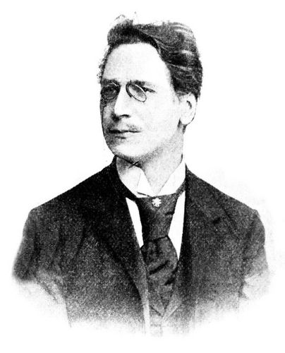 Karl Friedrich Henkell (1864–1929), deutscher Lyriker und Schriftsteller